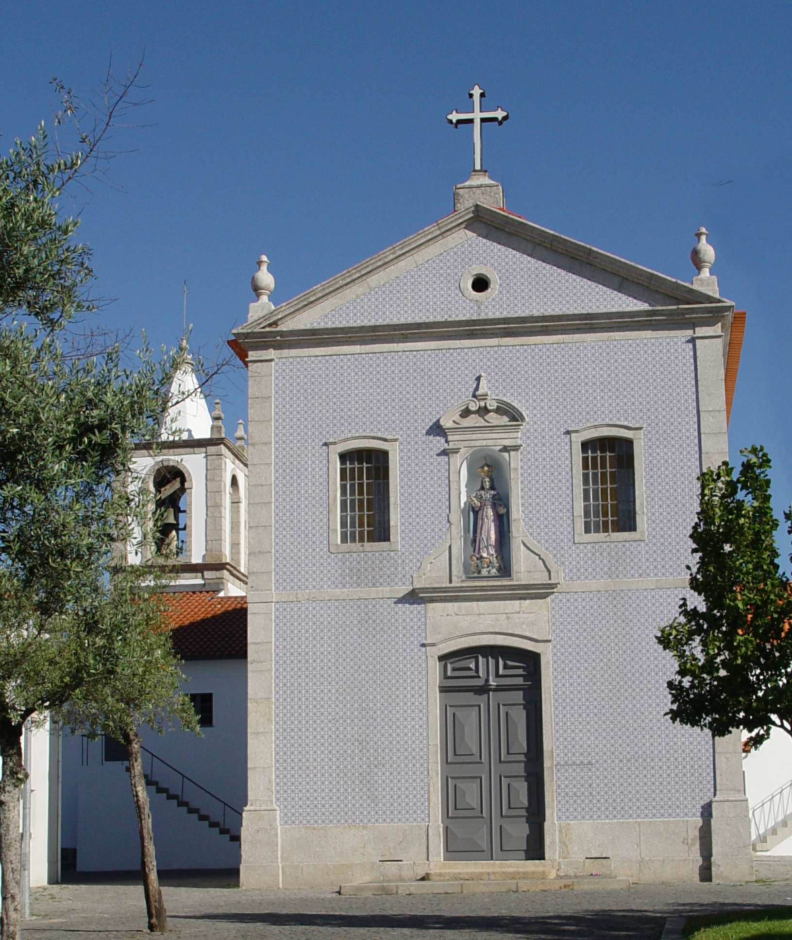 Ferreiros Church in Braga, Portugal